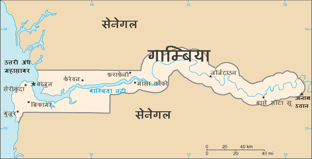 CIA map of Gambia